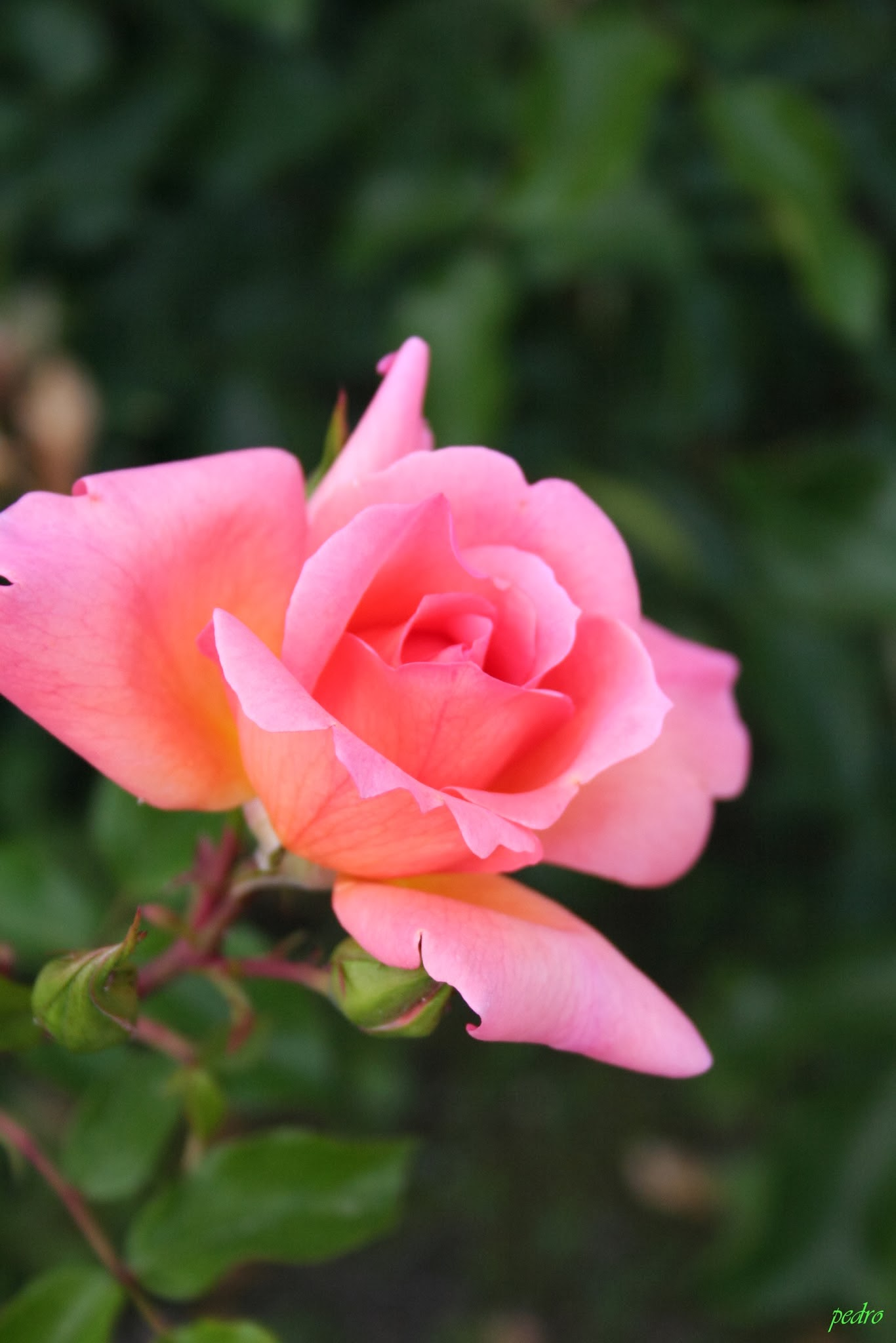 Rosa Regatta - EEUU..jpg